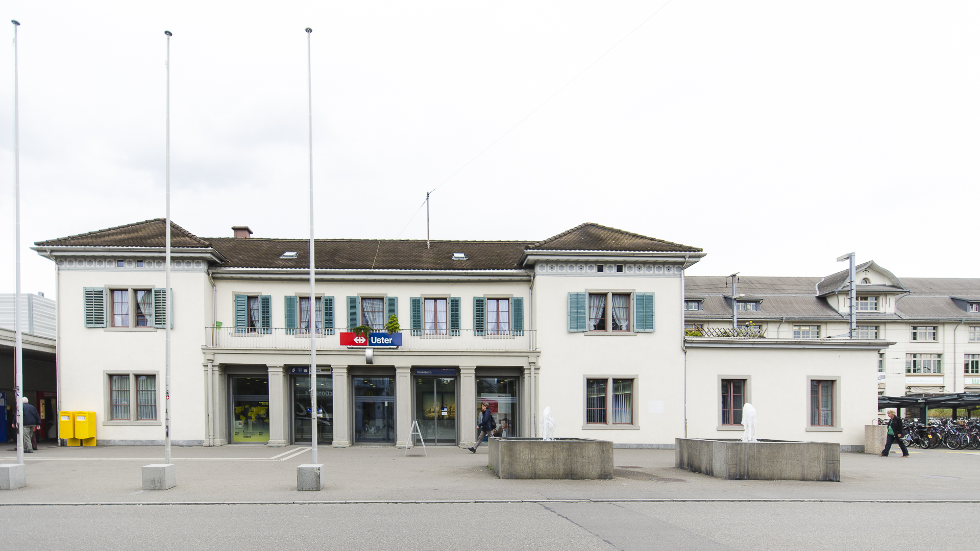 Bahnhof Uster, Aufnahmegebäude ID = CH-ZH/19801921